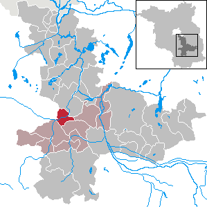 Rietzneuendorf-Staakow in Brandenburg (Country) - District Dahme-Spreewald